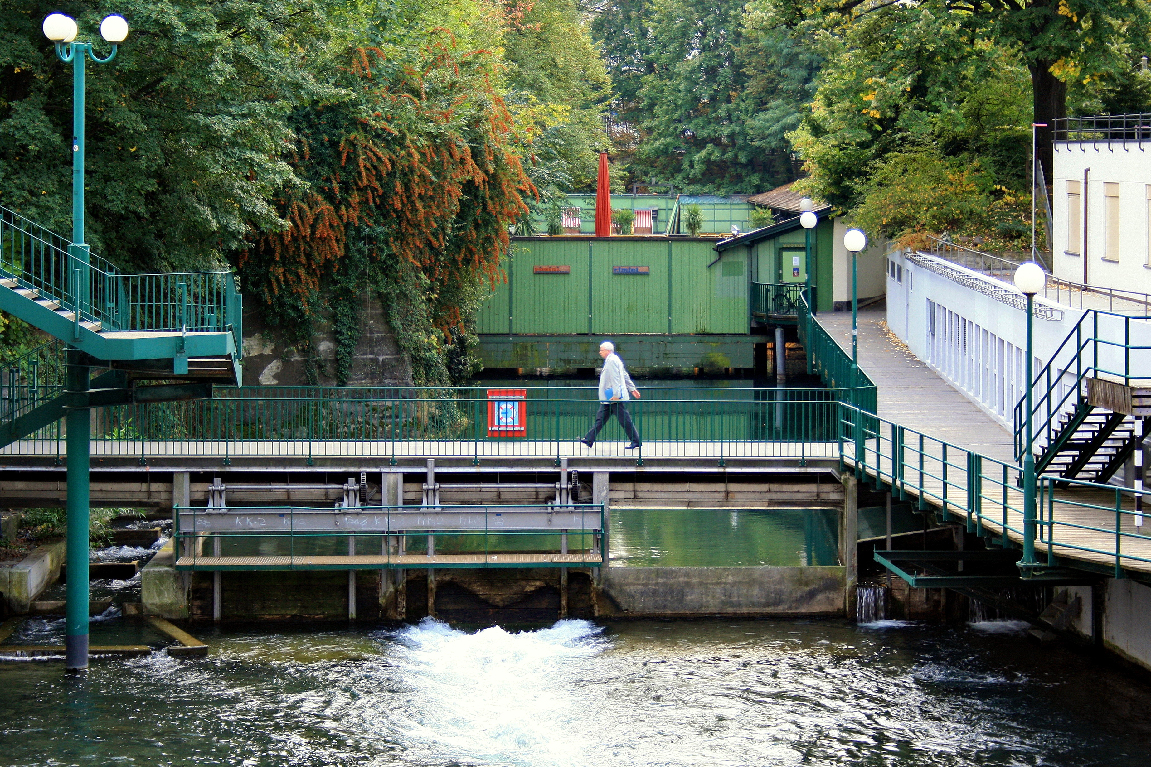 Schanzengraben and Männerbad (Men's bath) in Zürich (Switzerland), Botanical Garden to the left, as seen from Sihlporte.